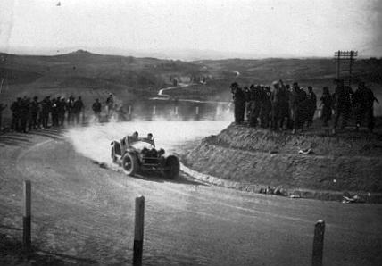 VI Coppa 1000 Miglia, Alfa Romeo 8C 2300 Spider Touring n. 115 di Caracciola-Bonini